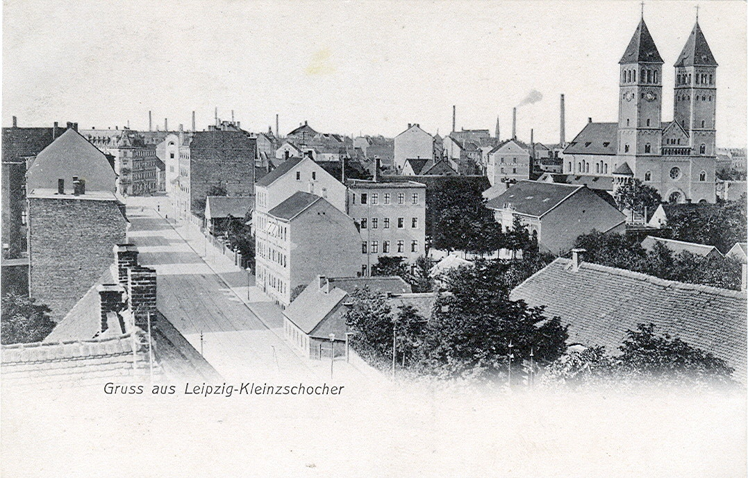 Postcard, ca.1917. Title:"Gruss aus Leipzig-Kleinzschocher".